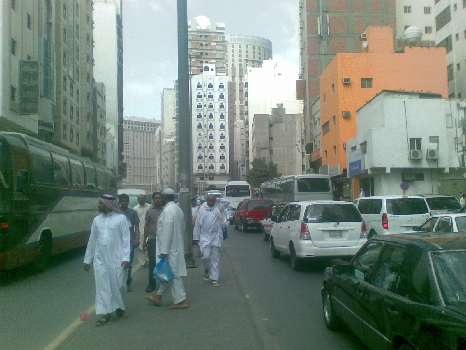 മക്കയിലെ തിരക്ക് പിടിച്ച റോഡ്‌